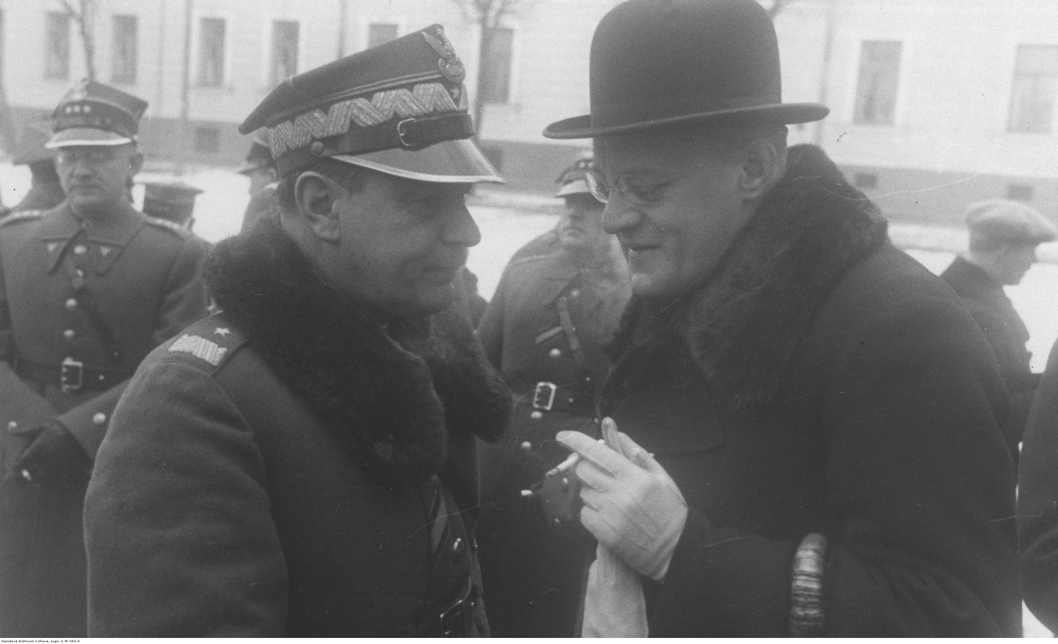 Jubileusz 10-lecia sprawowania dowództwa 18 DP gen. bryg. Czesława Młot-Fijałkowskiego. Generał Czesław Młot-Fijałkowski przyjmuje gratulacje od wojewody białostockiego Henryka Ostaszewskiego. Koncern Ilustrowany Kurier Codzienny - Archiwum Ilustracji. Sygnatura: 1-W-342-3